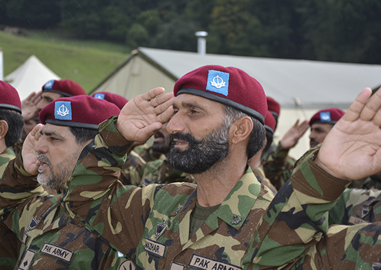 В Карачаево-Черкесии стартовало совместное российско-пакистанское учение «Дружба-2017»